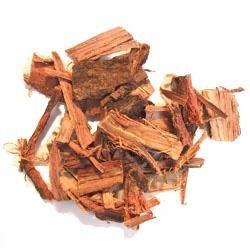 Mimosa Hostilis rootbark